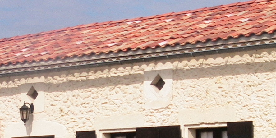 Fenestrons en Médoc. Photo personnelle.